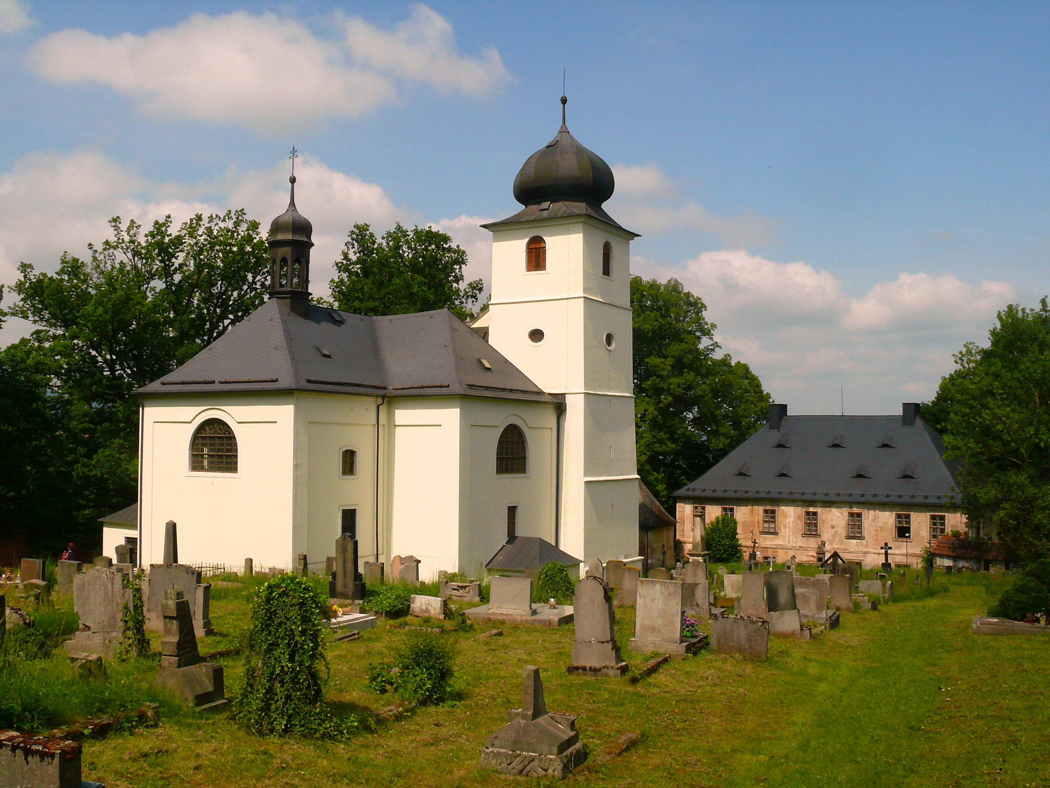 Kostel Panny Marie, svatého Jiří a svatého Martina s farou